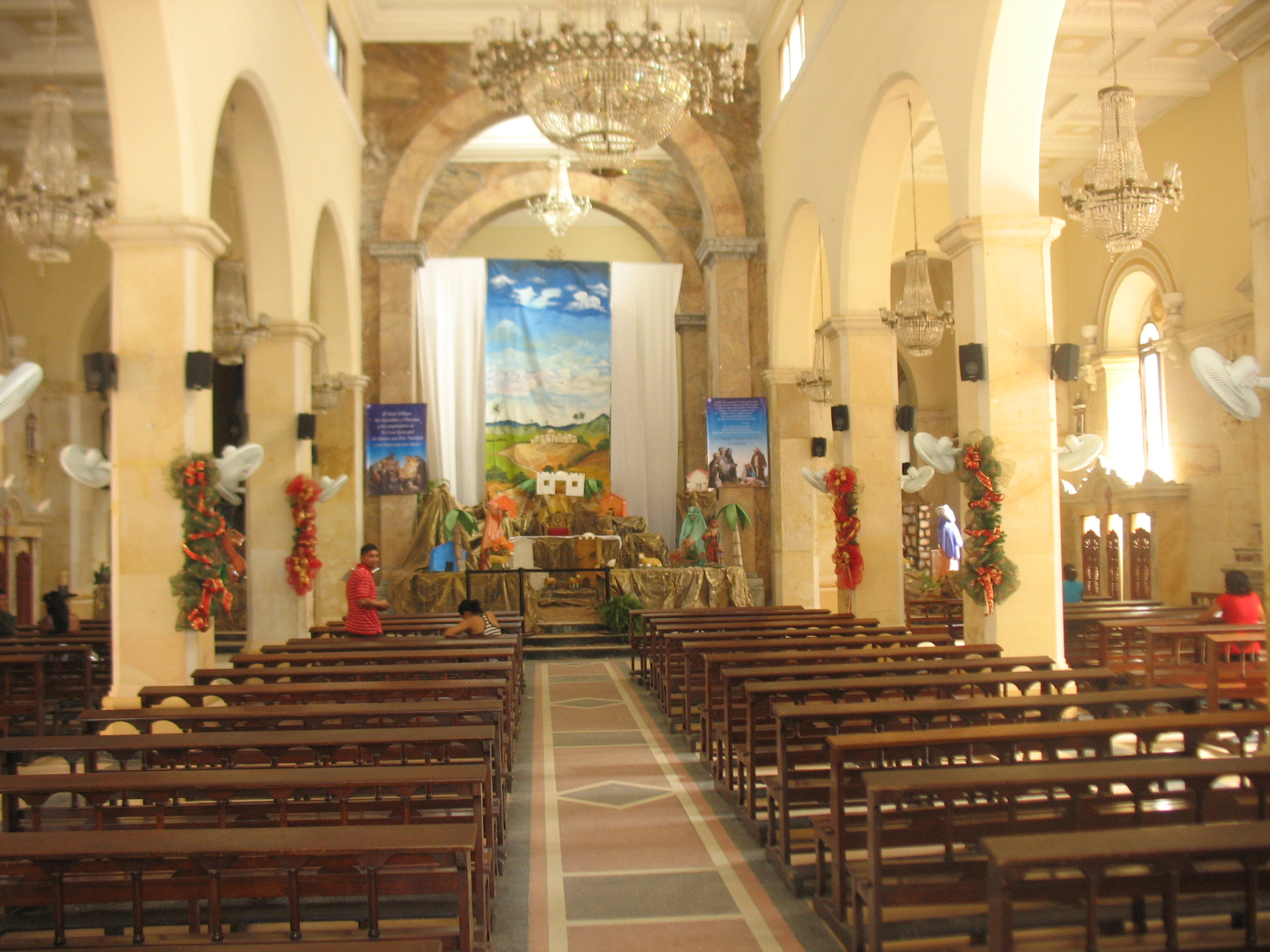 Catedral Nuestra Señora de Los Remedios